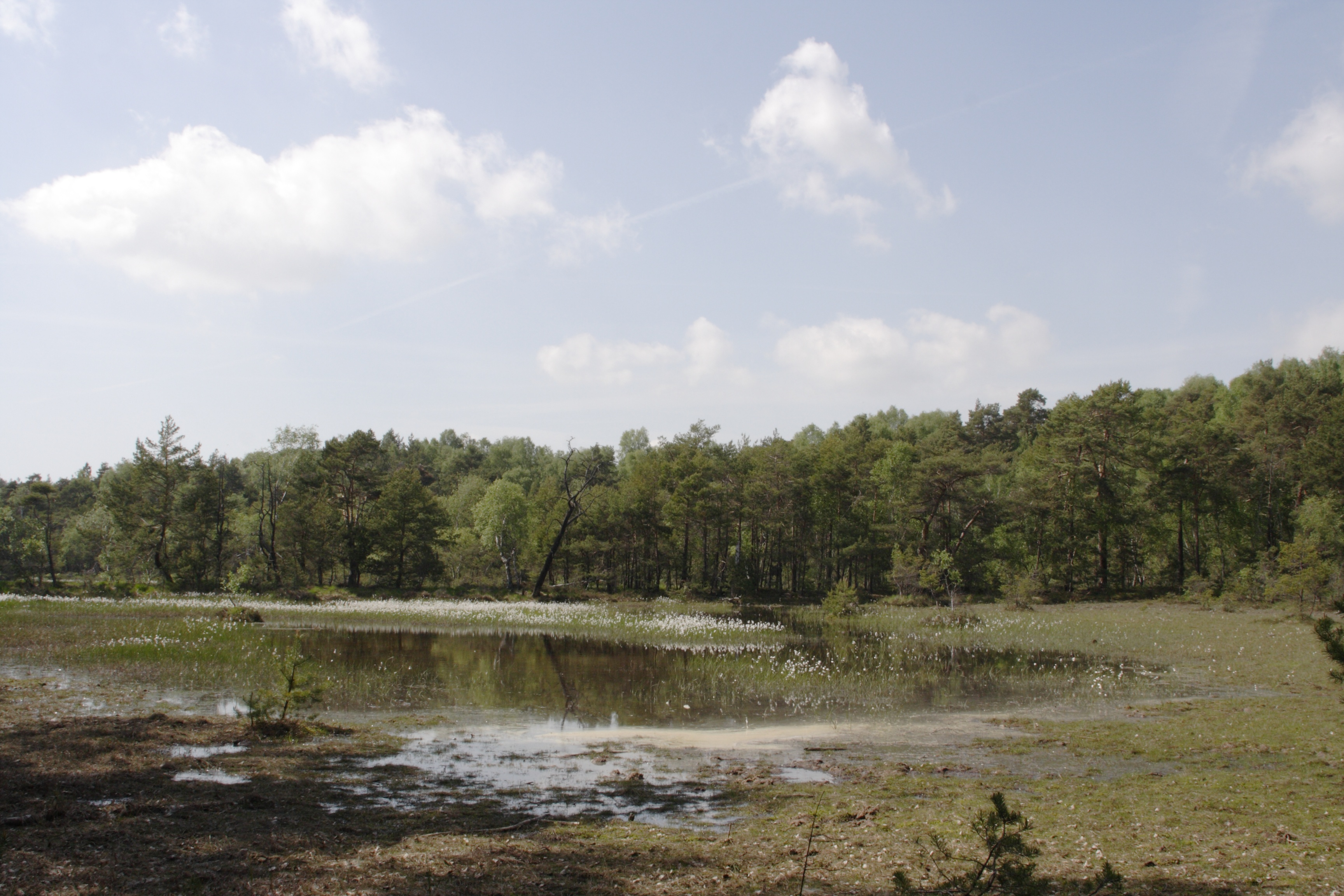 Dübener Heide - Zadlitzbruch - L 44